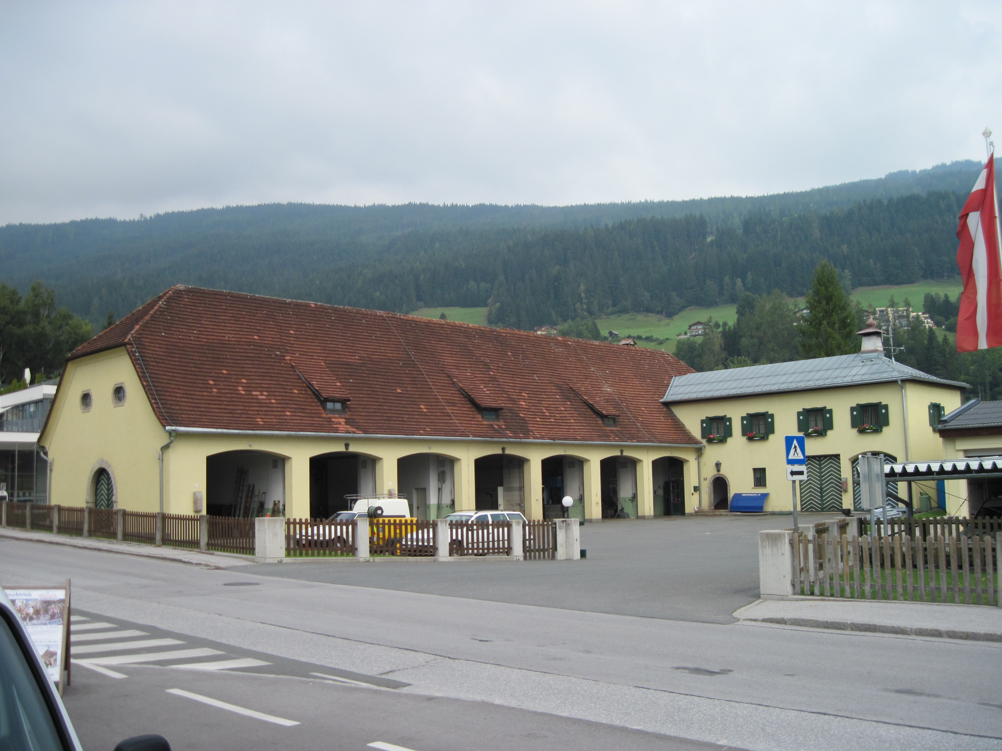 Straßenwärterhaus, Straßenmeisterei